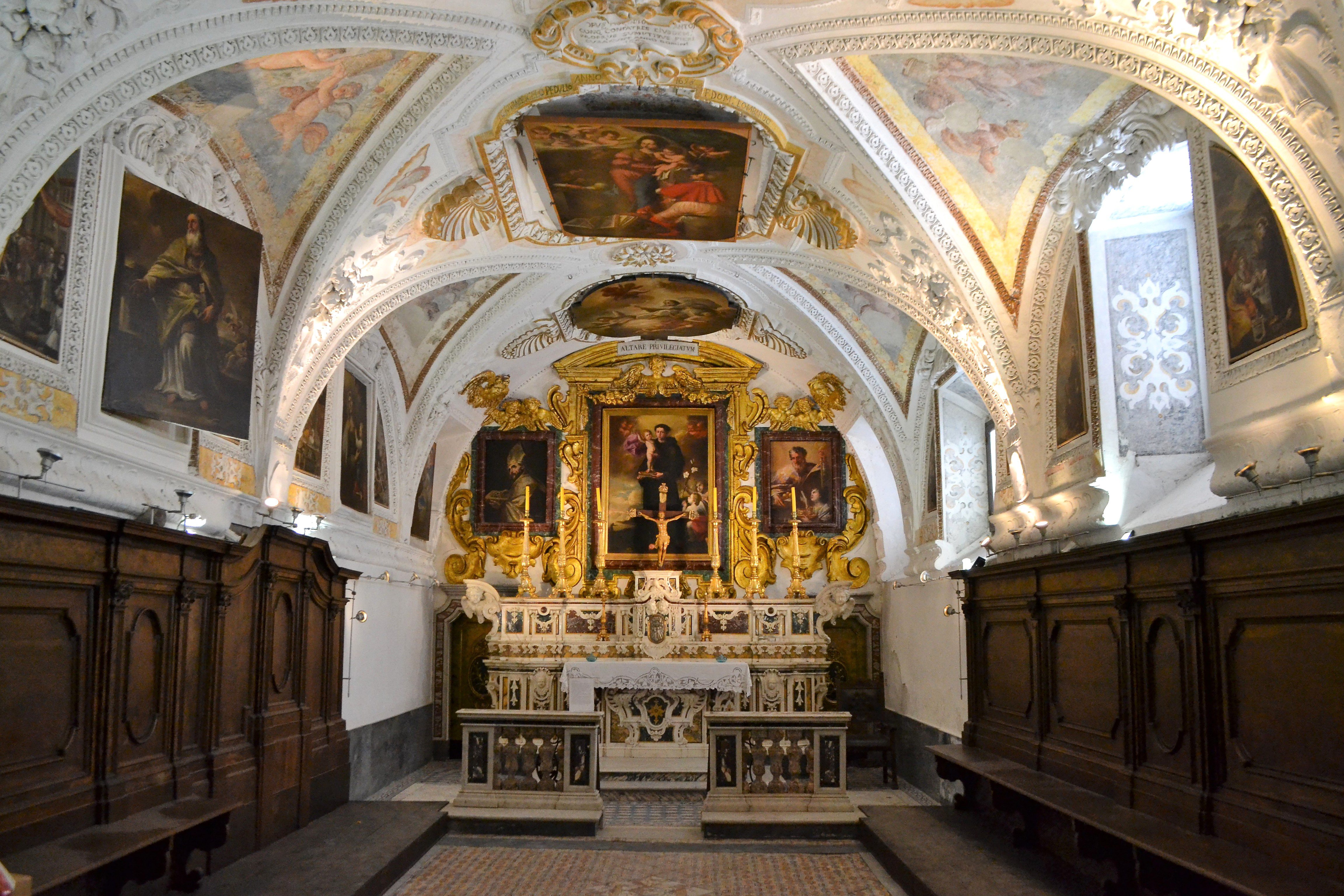 Chiesa di San Severo fuori le mura